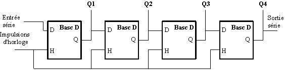 Schéma réalisé le 22 mars